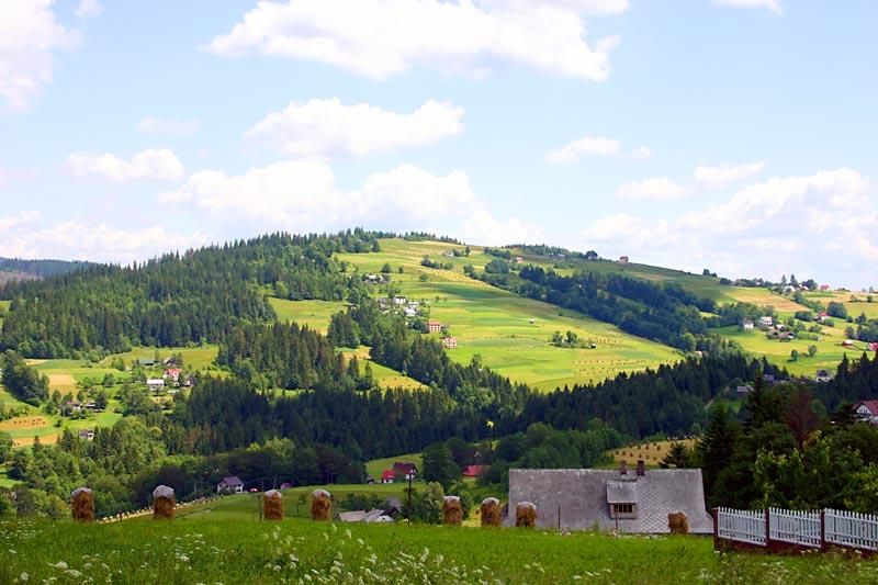 Góra Tyniok (892 m n.p.m.) widziana z Koniakowa